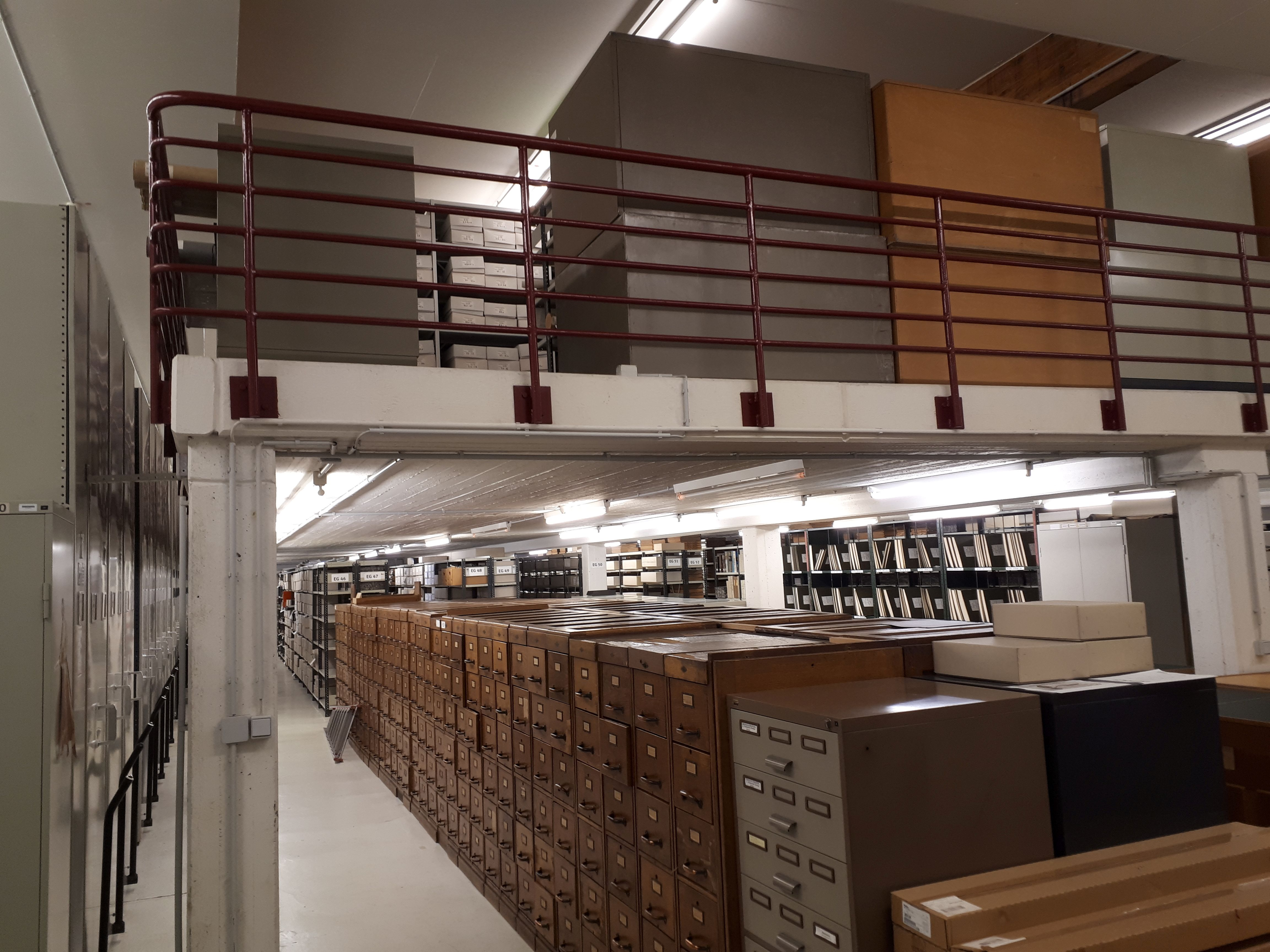 Blick in das Magazin des Stadtarchivs Krefeld